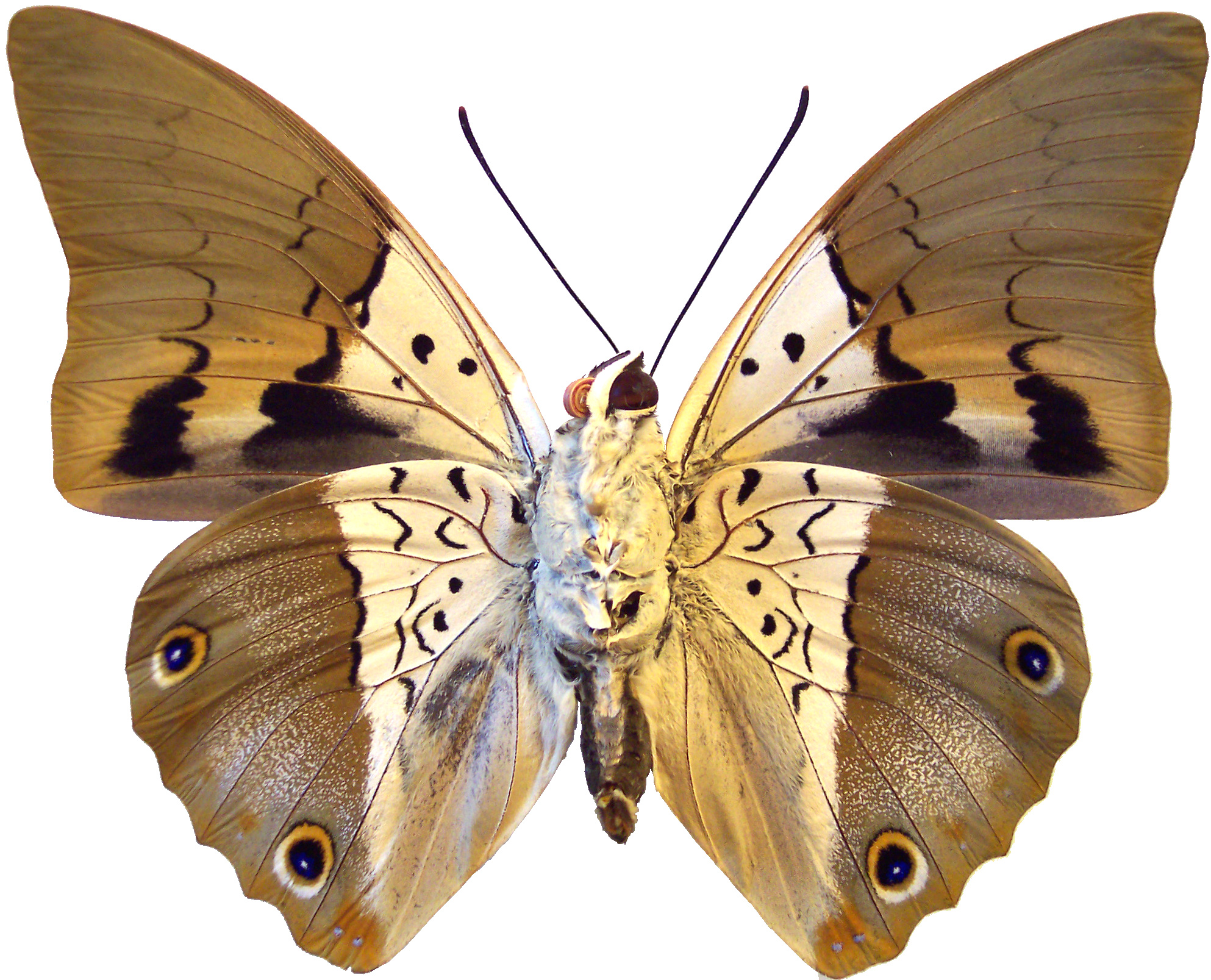 Prepona dexamenus face ventrale de Satipo, Junin, Pérou